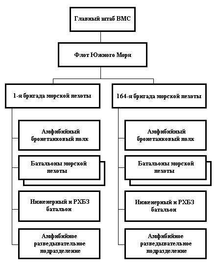 Организационная структура морской пехоты КНР